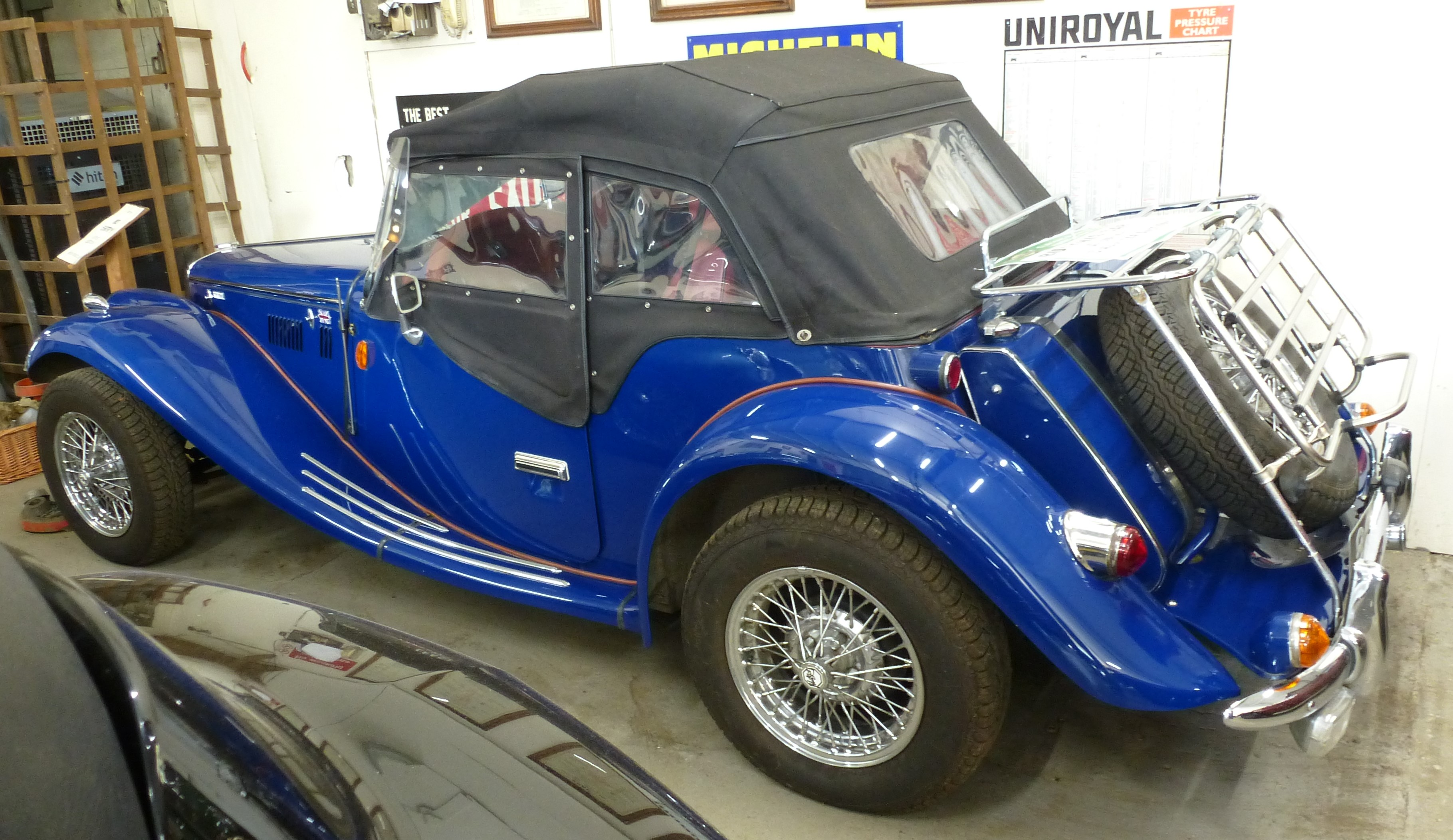 Hutson TF 1700 1991